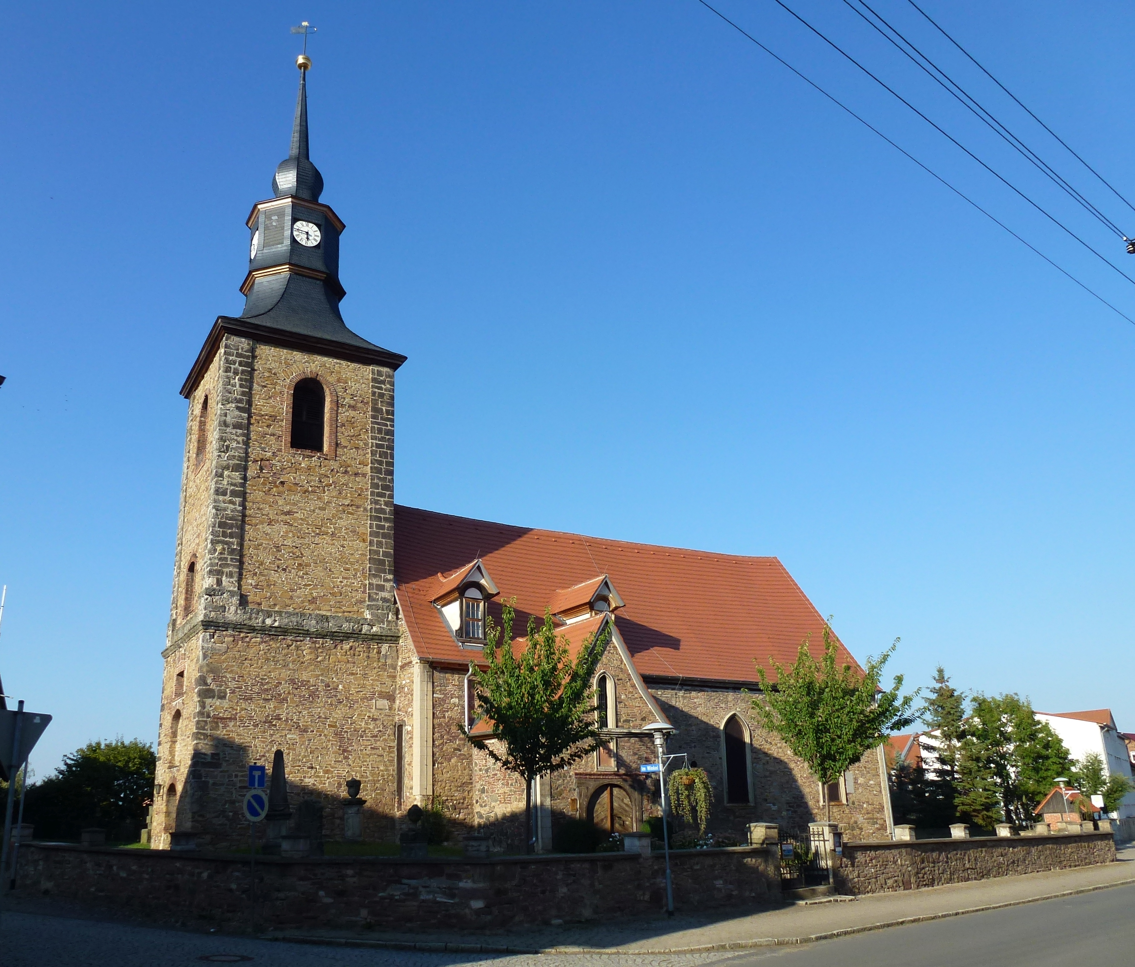 Evangelische Kirche Meisdorf.